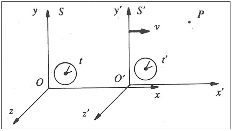 Bata bestearekiko abiadura konstantez higitzen diren bi erreferentzia-sistemaren adierazpen grafikoa.